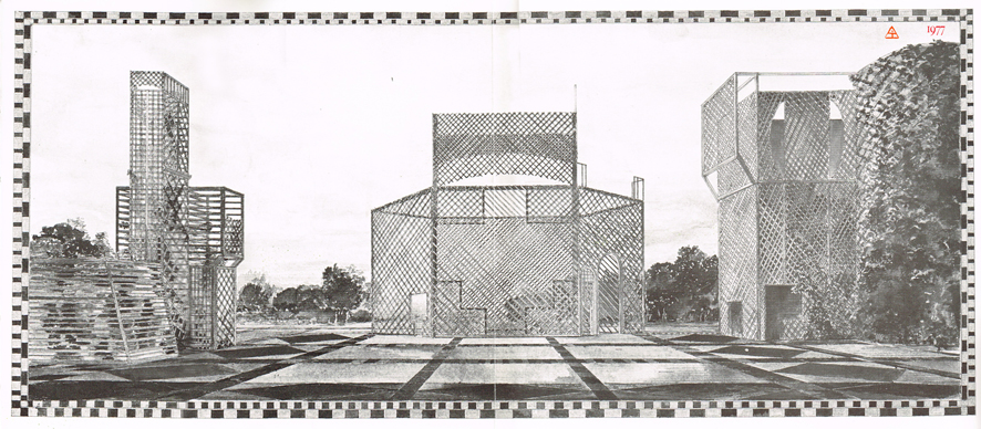 Dessin extrait de "Tuteurs fabuleux" 1977